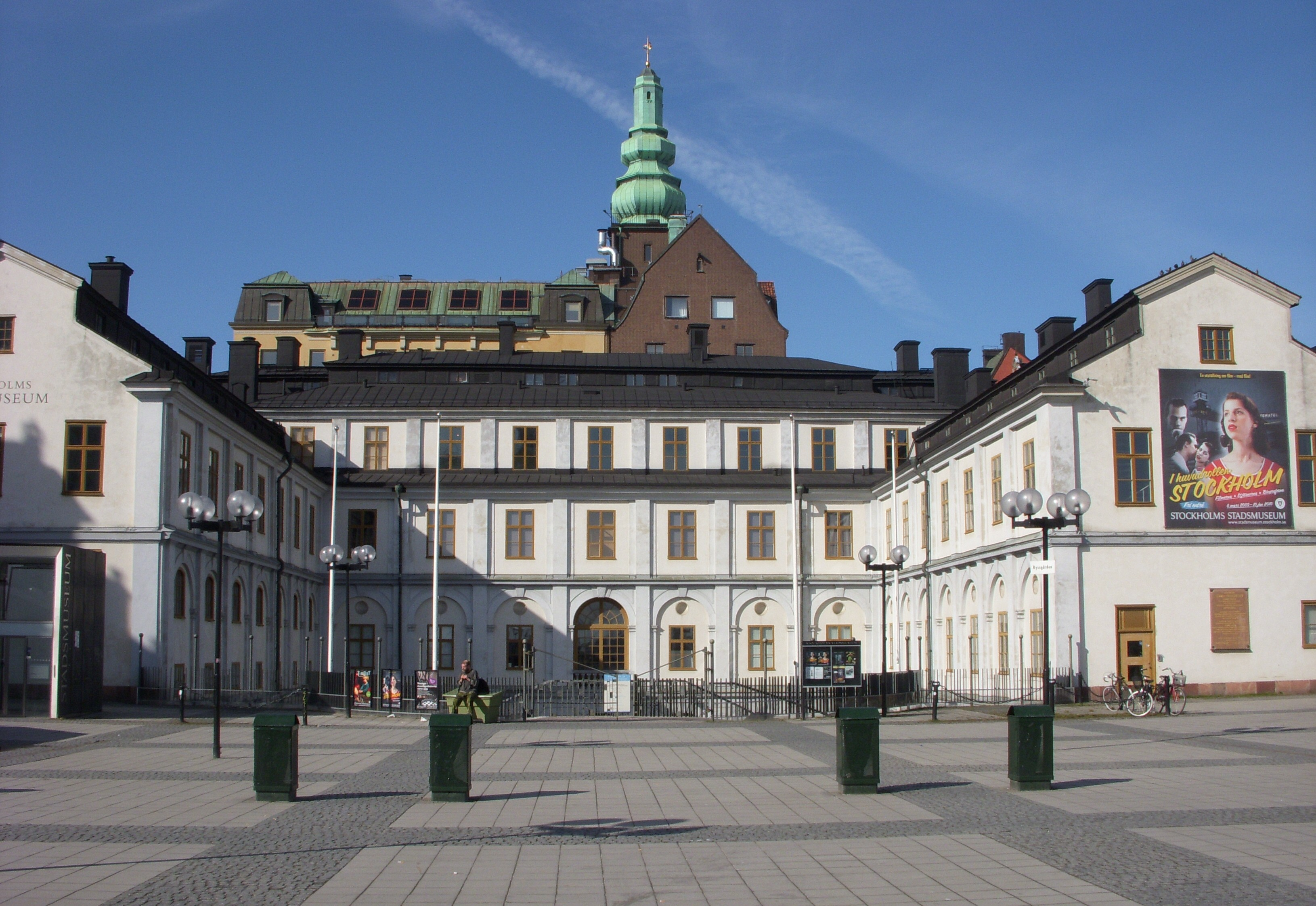 Stockholms stadsmuseum, fasad mot öst (entréfasad)